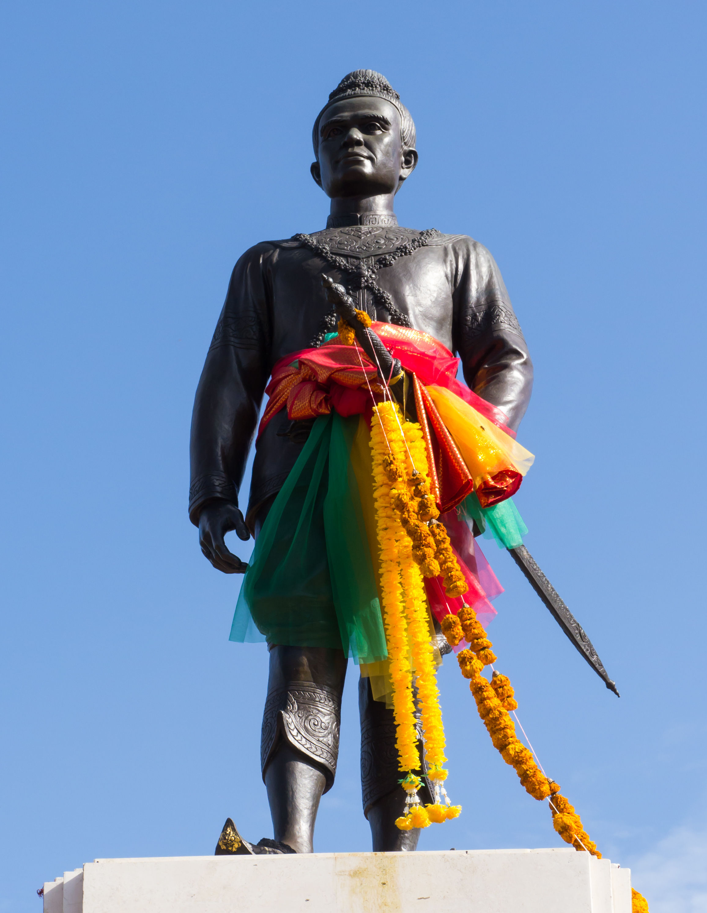 พระบรมราชานุสาวรีย์สมเด็จพระรามาธิบดีที่ 1 (พระเจ้าอู่ทอง)